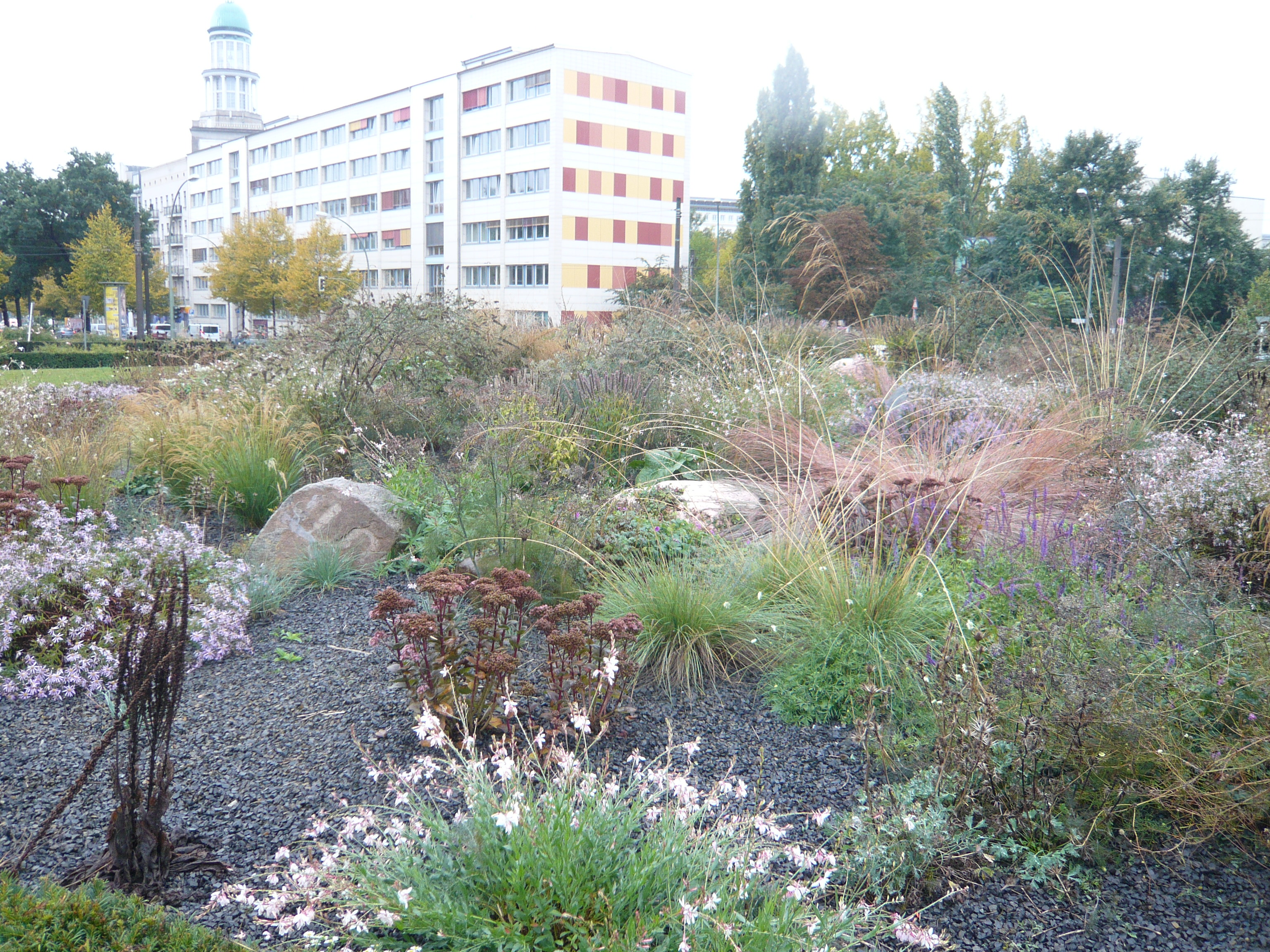 Bersarinplatz in Berlin-Friedrichshain: "Kiesgarten"